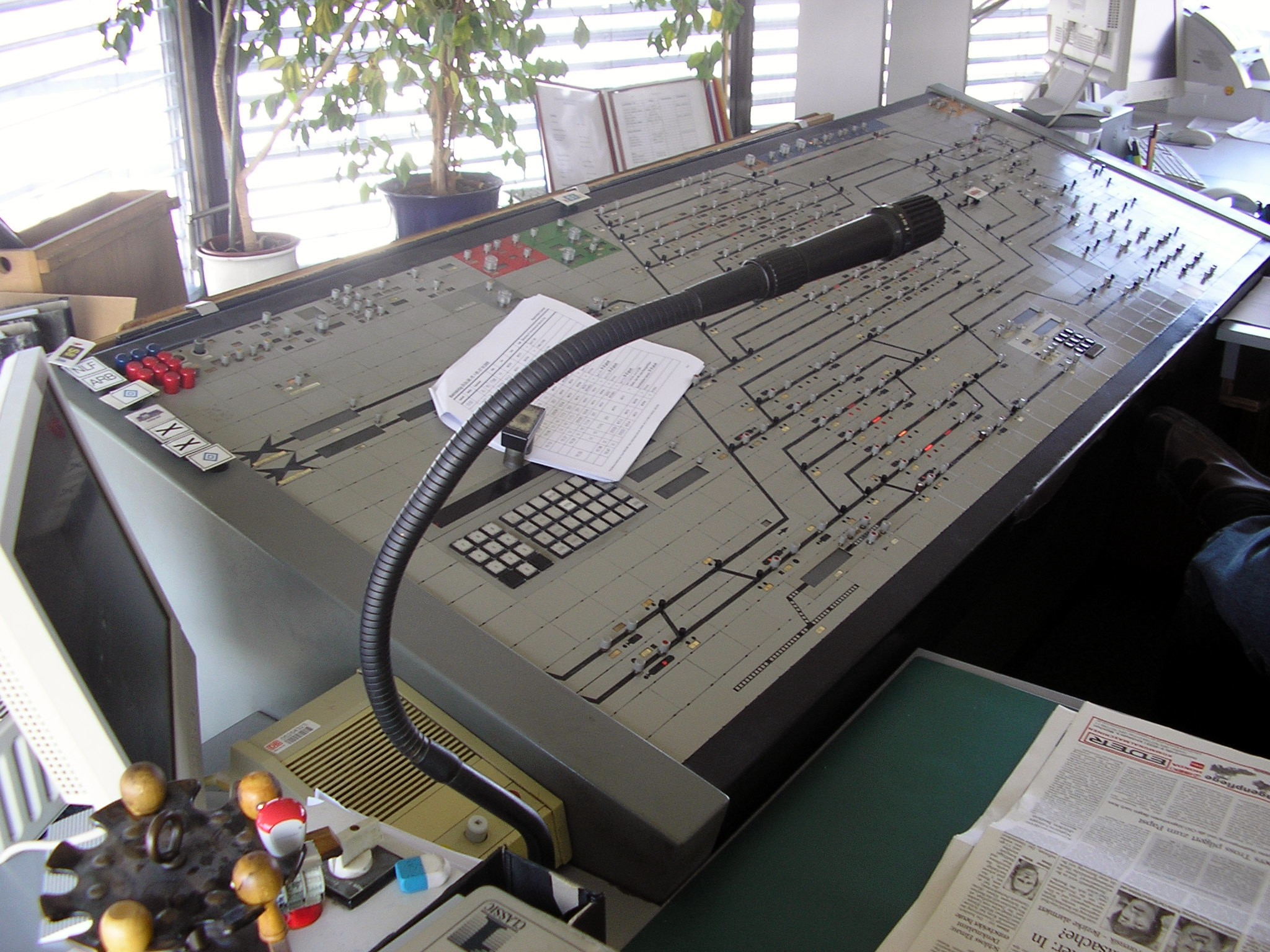 Spurplan-60-Stellwerk im S-Bahn-Betriebswerk Bahnhof München-Steinhausen Autor: Roland Steller